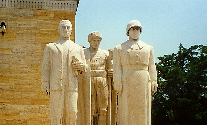 Statuen beim Atatürk-Mausoleum.